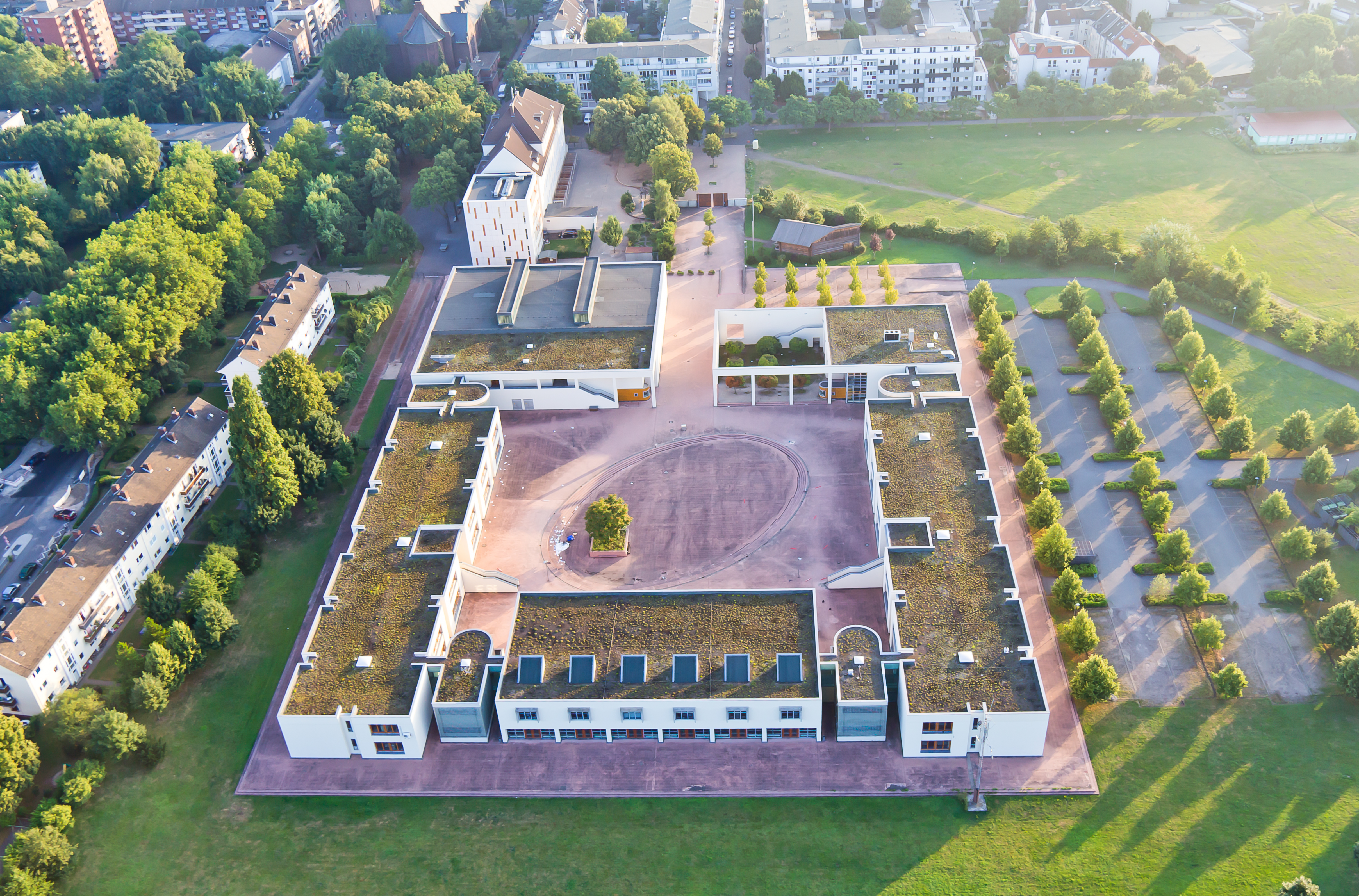 Ballonfahrt über Köln - Georg-Simon-Ohm-Schule